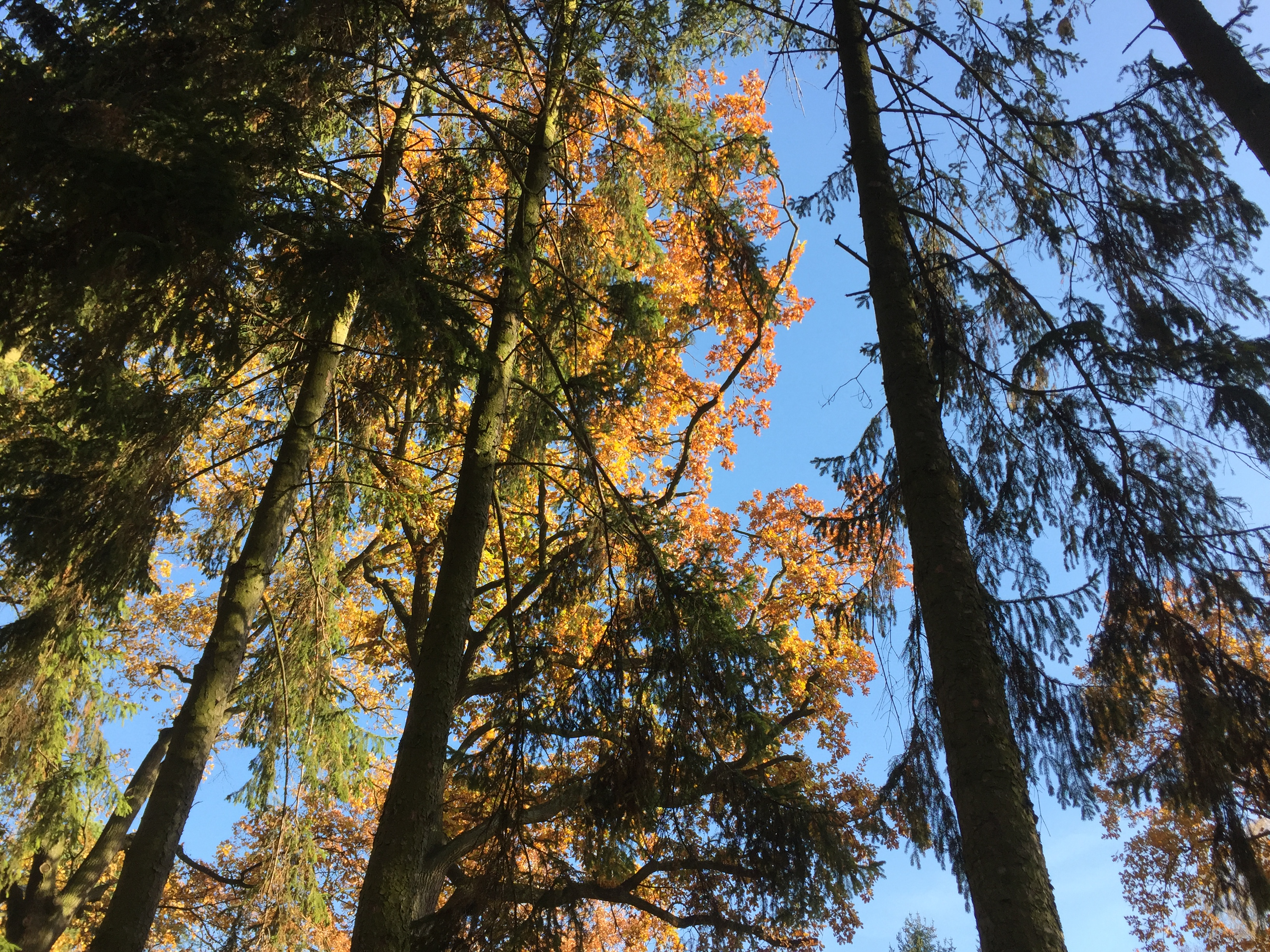 Jesienne drzewa na zaniemyskim cmentarzu na początku listopada.